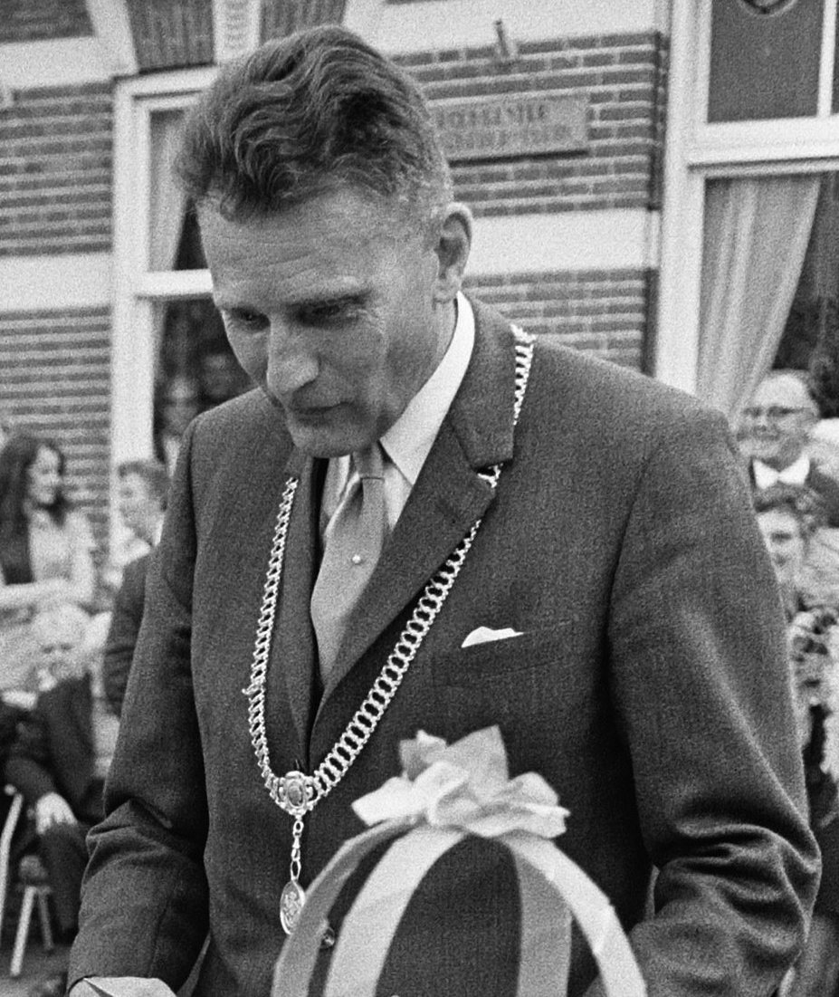 Hare Majesteit bezoekt Oost-Groningen. Koningin Juliana bezoekt Winschoten en ontvangt een Winschoter koek